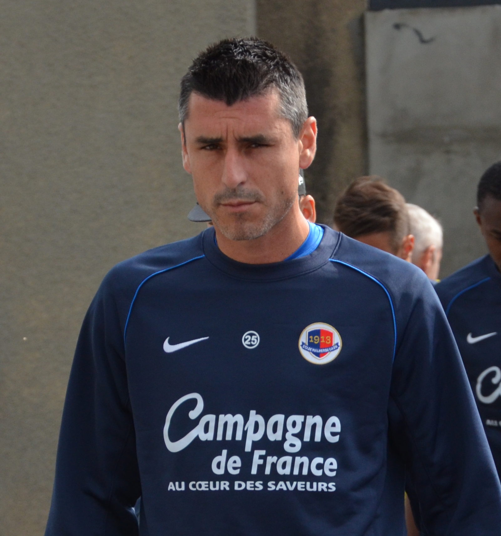 Photographie prise à l'occasion de la rencontre amicale opposant le Stade Malherbe de Caen au Stade rennais, le 9 juillet 2014 au stade Pierre-Comte de Vire. Ici, Julien Féret.